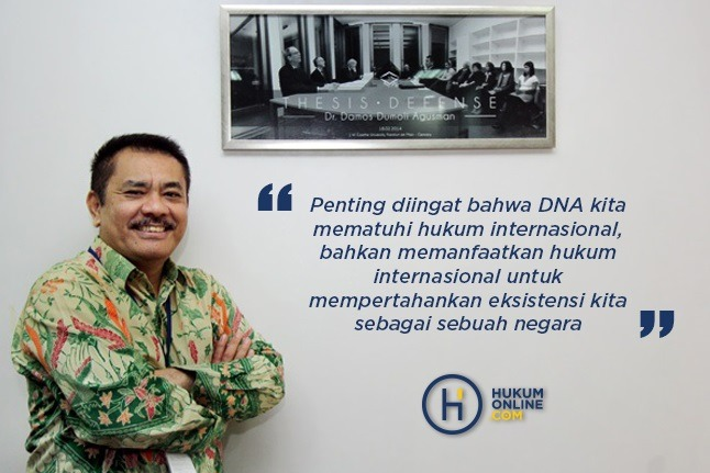 Director General for International Law and Treaties